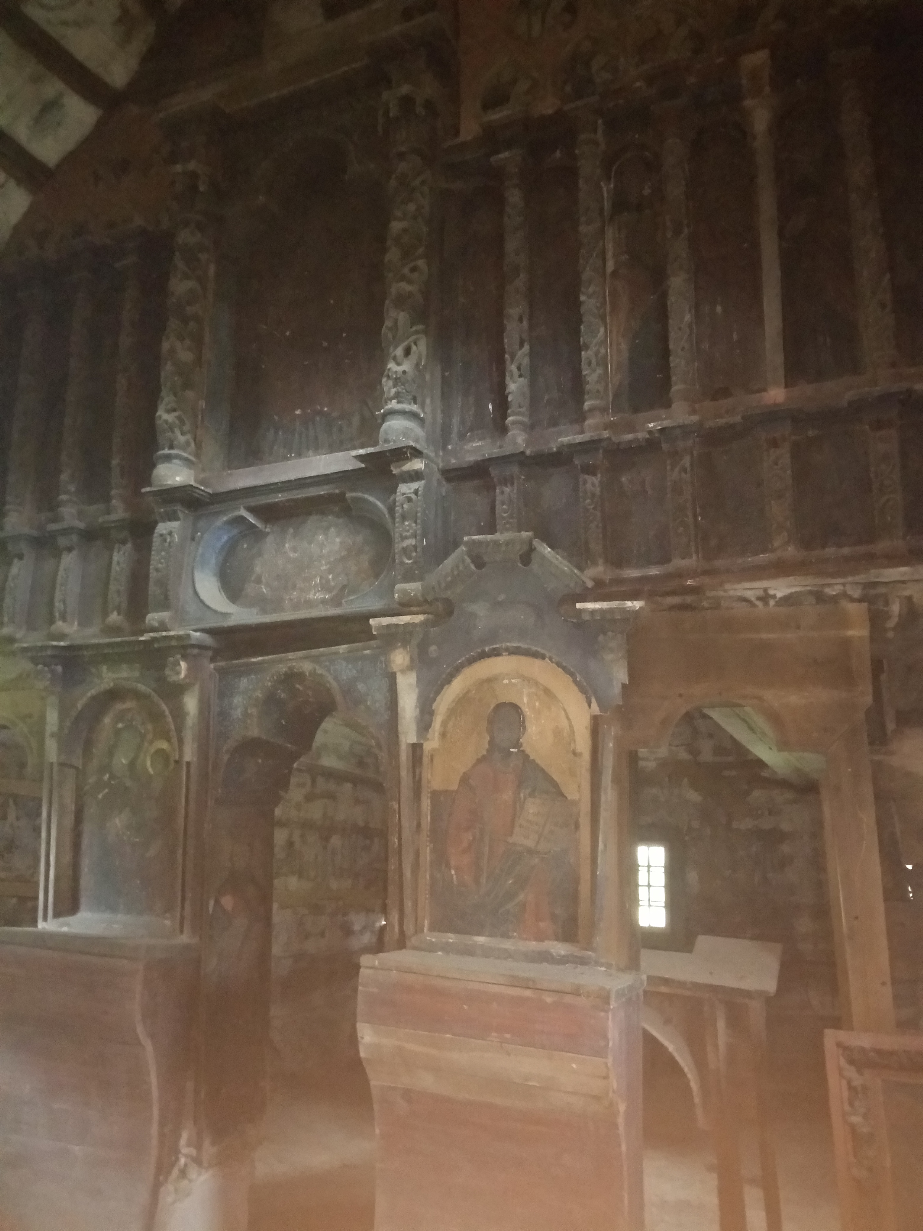 фотографія